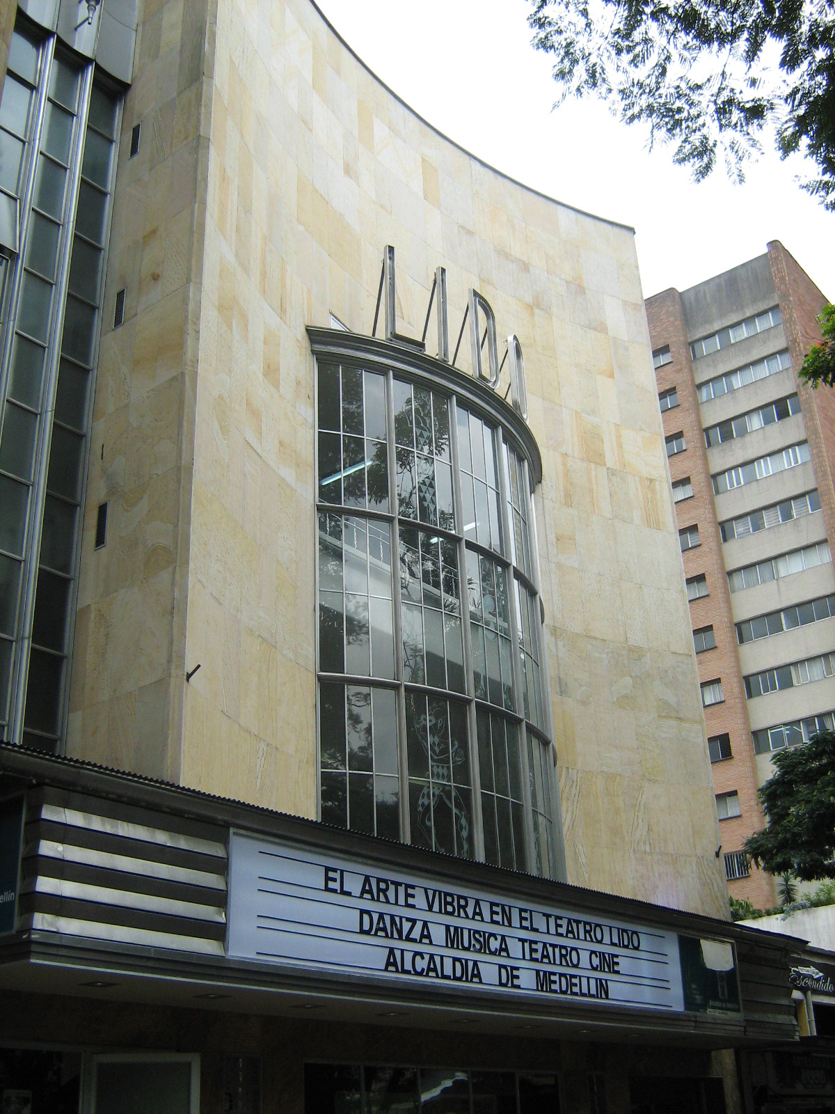 Teatro Lido ubicado al costado oriental del Parque Bolivar, Medellín, Colombia.